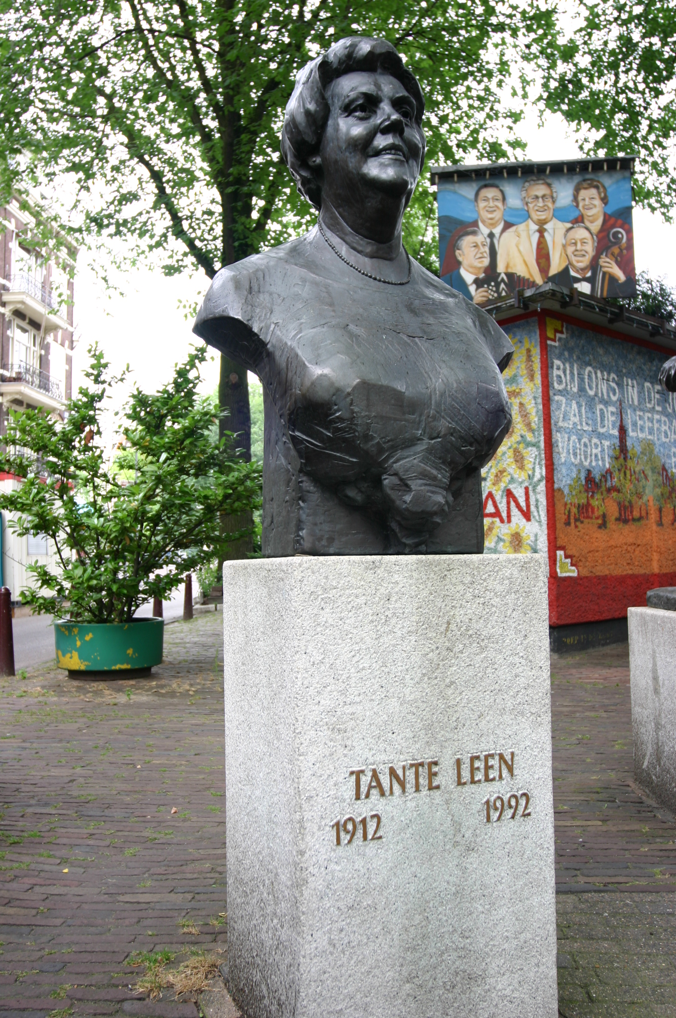 Beeld van Tante Leen op het Johnny Jordaanplein in Amsterdam Categorie:Wikipedia:Afbeeldingen/Gebruiker:Luijt Categorie:Afbeelding Amsterdam